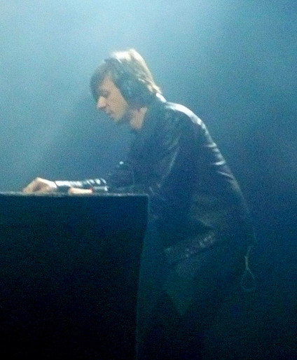 Pukkelpop 2009 // Day 03 // SA 22 Martin Solveig